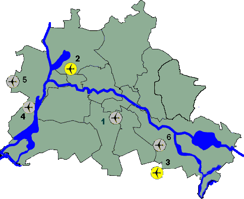 Position of the airports in Berlin (legend see below) Lager der Berliner Flughäfen (Legende s. unten) Poloha berlínských letišť (popisek viz níže)